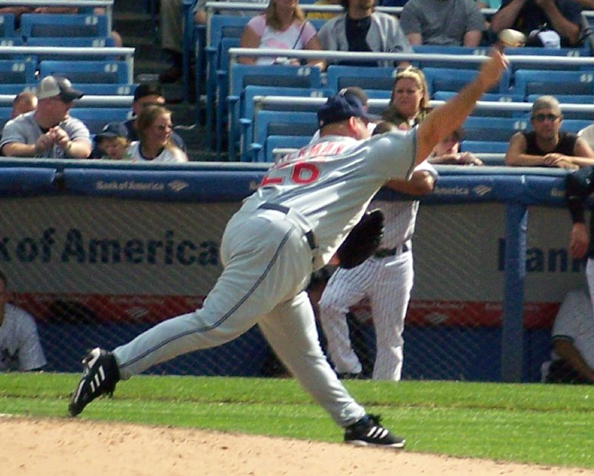 Bob Wickman